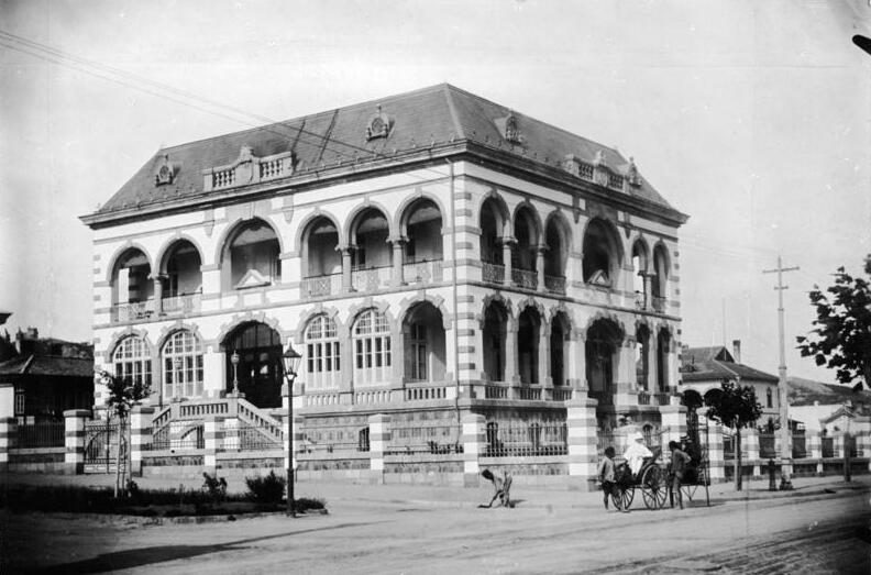 China, Tsingtau, ehem. Deutsch-asiatische Bank China, Tsingtau Ehemalige Deutsch-asiatische Bank, jetzt japan. Kosulat.